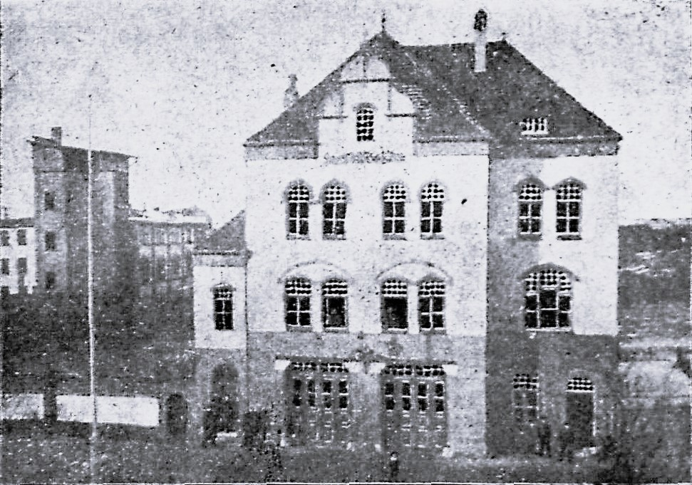 Die Feuerwache St. Lorenz zu Lübeck nebst Steigerthurm und Turnhalle. Dem Betriebe übergeben am 13. Januar 1902.